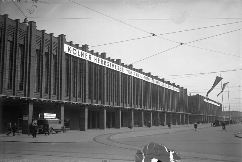 Die Eröffnung der grossen Kölner Herbstmesse in Köln a/Rh. Aussenaufnahme der riesigen Ausstellungshalle der grossen Kölner Herbstmesse in Köln a/Rhein.